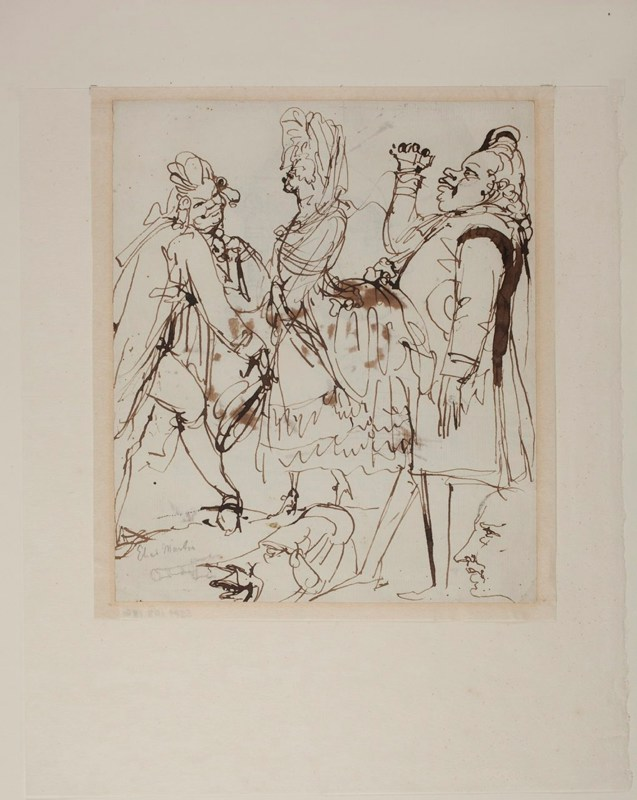 Johan Tobias Sergel, Karikatyr med fyra herrar och en dam, bland dem troligen Elias och Johan Fredrik Martin med dam, tusch, cirka 1790. Stockholms stadsmuseum. Inventarienummer: 081860. Unikt dokument ID: SSM_108186_0.